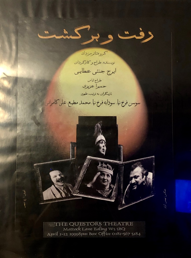 پوستر تأتر رفت و برگشت